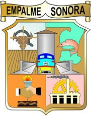 Al margen superior izquierdo se observa una surquería con espigas de trigo, una hoz, y una cabeza de ganado bovino, que significa que la región tiene agricultura y ganadería; al margen superior derecho se observa un estero, el estero del rancho y la bahía de Empalme, donde se practica la pesca deportiva y ribereña; en el margen superior izquierdo se observa una corona de laurel, dos manos entrelazadas y una antorcha encendida que significa Amistad y Sabiduría; en el margen inferior derechos e observan los talleres generales de los Ferrocarriles Nacionales de México con vías de acceso al mismo, que significa industria de Empalme, estos talleres ocupan el segundo lugar por su importancia en los Ferrocarriles Nacionales; al frente tiene el Tinaco, flanqueado por dos rieles y al centro una máquina moderada diesel característica principal de la ciudad de Empalme, Sonora.